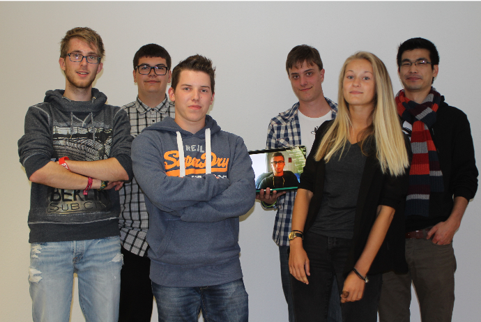 Foto vum Jonk Piraten Comité, nom Kongress 2014